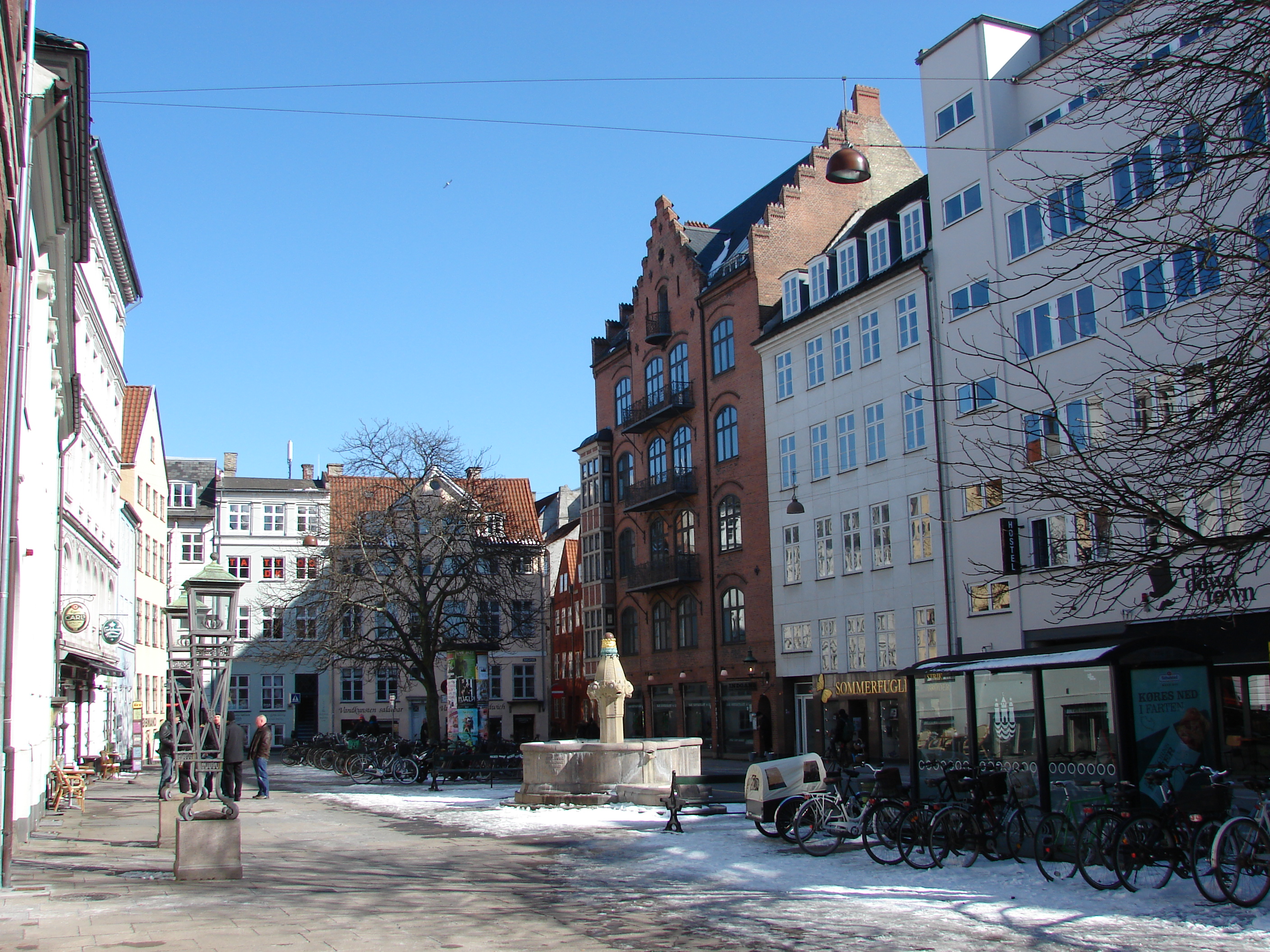 Vandkunsten i København